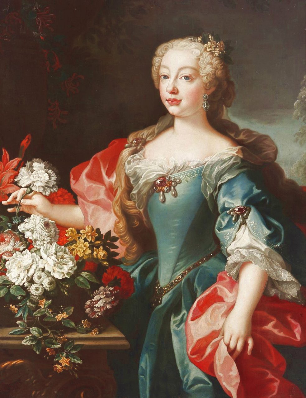 Mariana Victoria de Borbón y Farnesio; (Madrid, 31 de marzo de 1718 - Lisboa, 15 de enero de 1781), apodada la Infanta-Reina, era la hija mayor de Felipe V y de su segunda esposa Isabel de Farnesio.